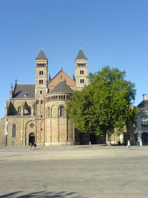 St. Servaas Basiliek Maastricht